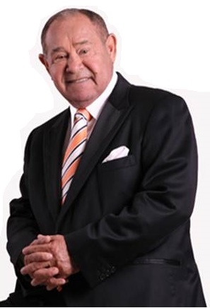 Memo Morales en la actualidad, 2010